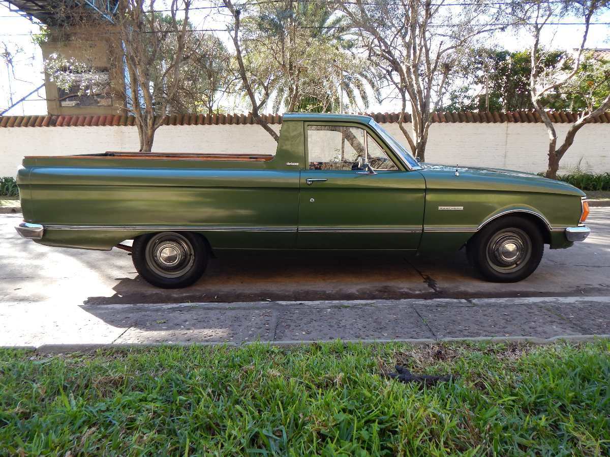 Ford Falcon Ranchero, производившийся в Аргентине с 1973 по 1991 годы. Данная модель Ford Falcon Ranchero Deluxe относится к серии автомобилей, производившихся с 1973 по 1977 гг.